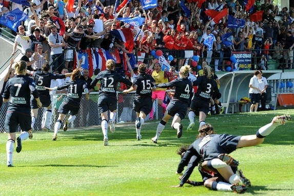 Scène de joie